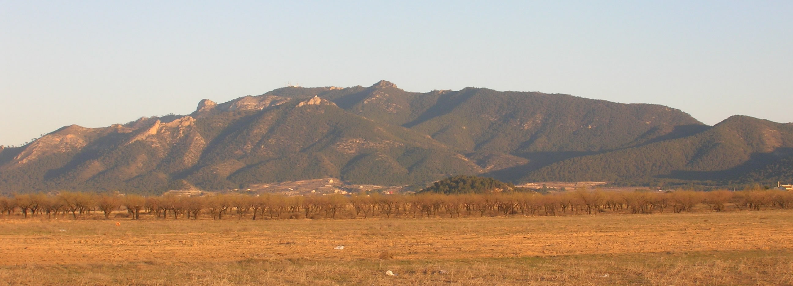 Sierra de Ricote, en el valle de Ricote, Murcia, España, febrero de 2006, desde el enlace de la carretera de Ricote con la que va de Cieza a Mula.